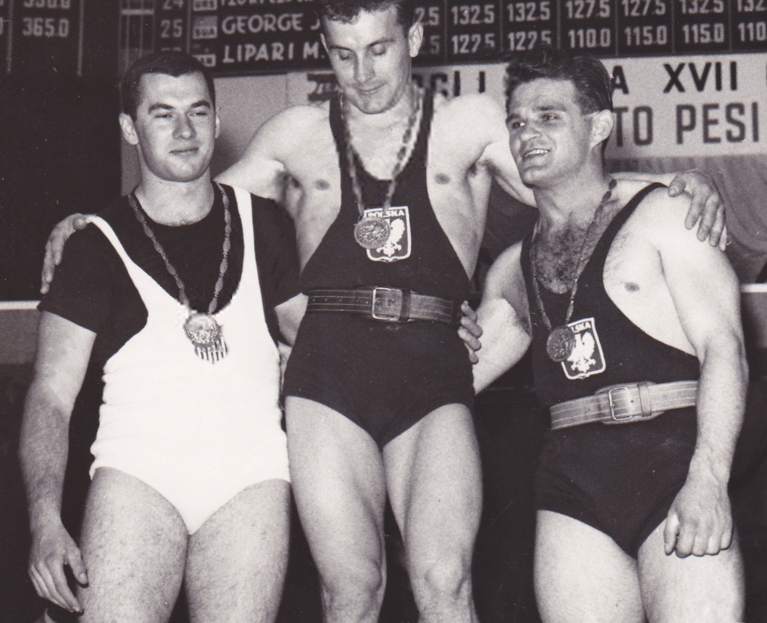 Podium: Jim George, Ireneusz Paliński, Jan Bochenek, 1960